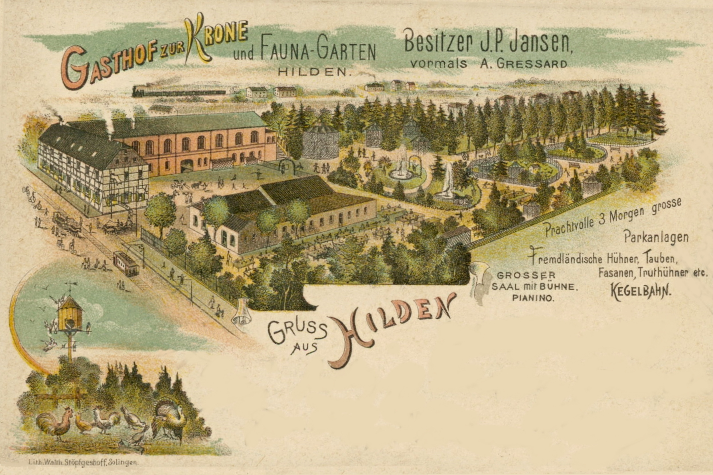 Werbepostkarte "Gasthof Zur Krone und Fauna-Garten", früher Hilden, Mittelstraße 17